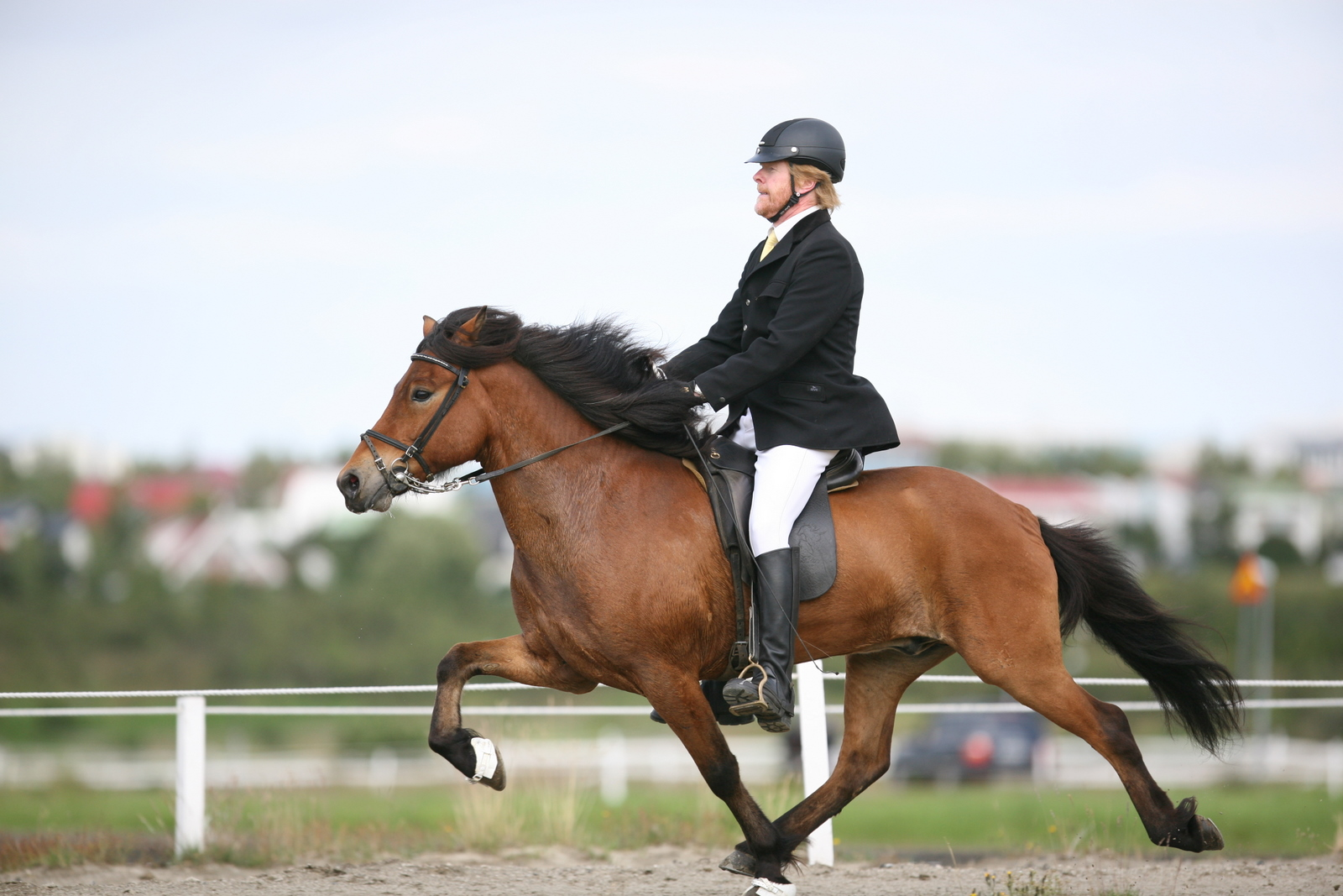 Sigurbjörn Bárðarson Ofsi frá Stóru-Ásgeirsá Jarpur/milli- einlitt Fákur